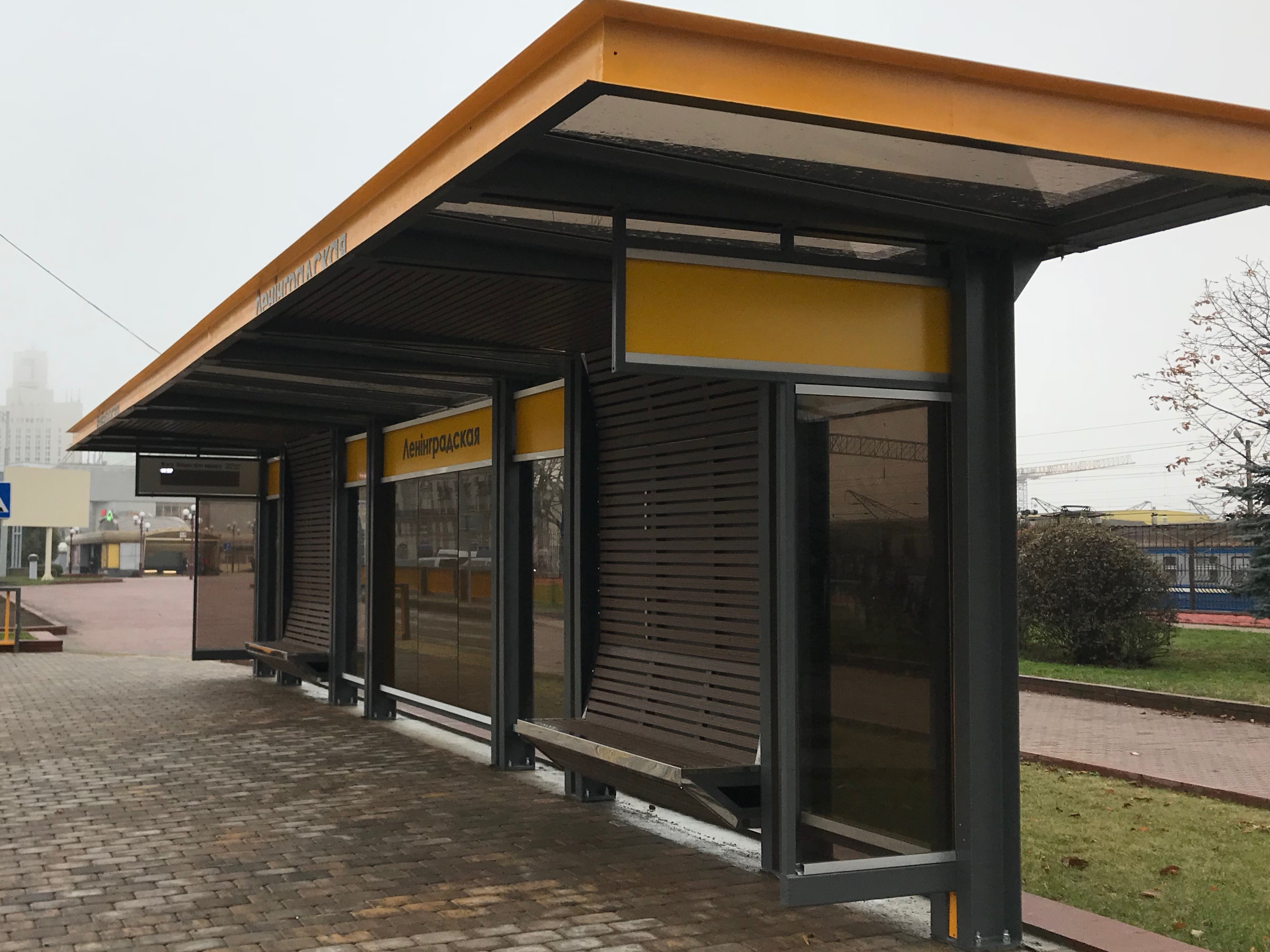 Остановочный пункт "Ленинградская" в направлении ДС "Мясникова".